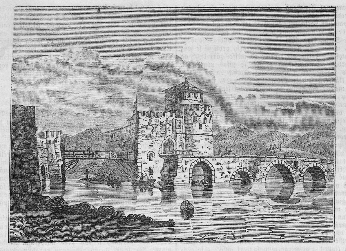 Most přes průliv Euripos, který odděluje řecký ostrov Euboia od pevniny